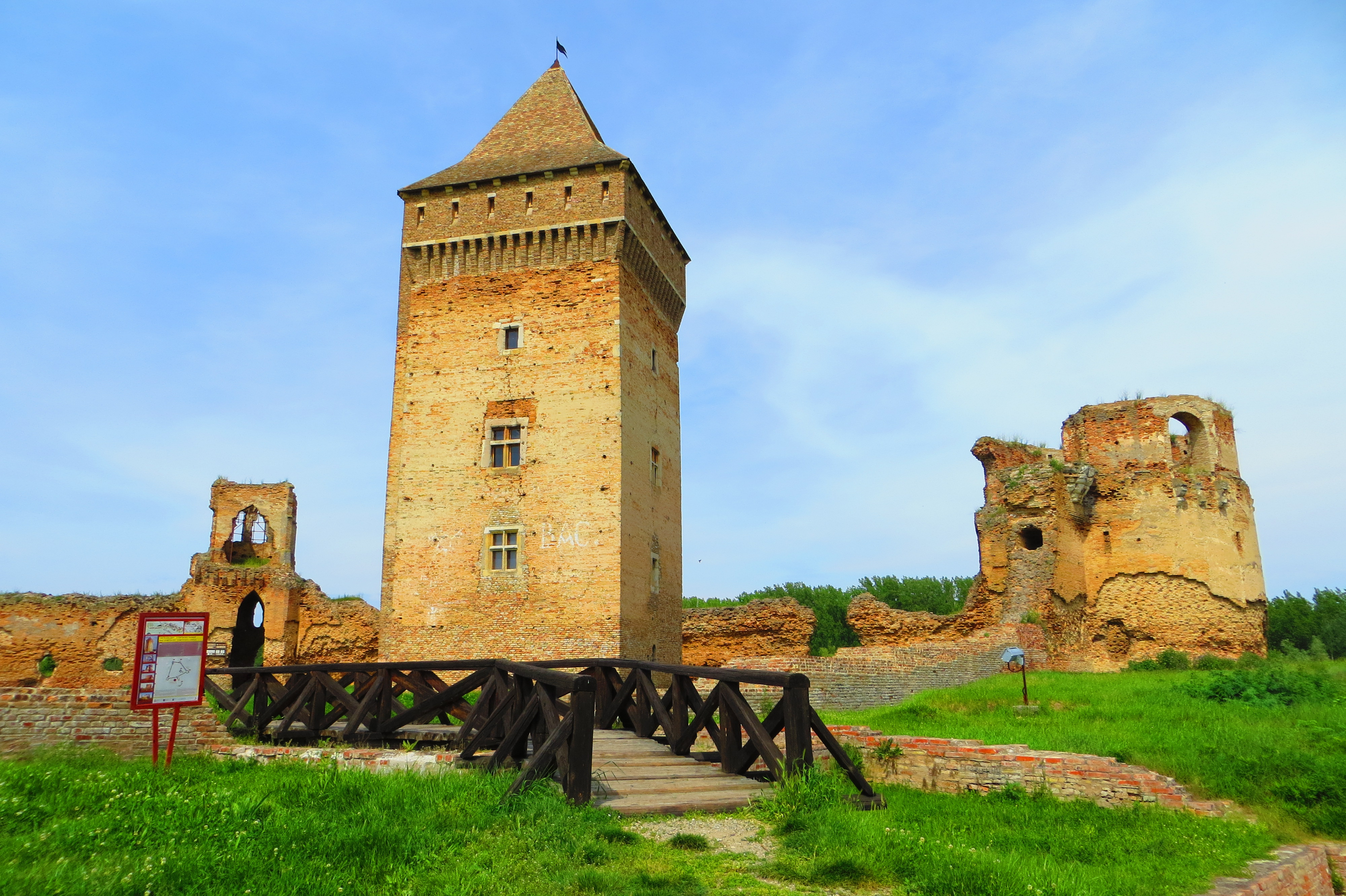 Bačka tvrđava